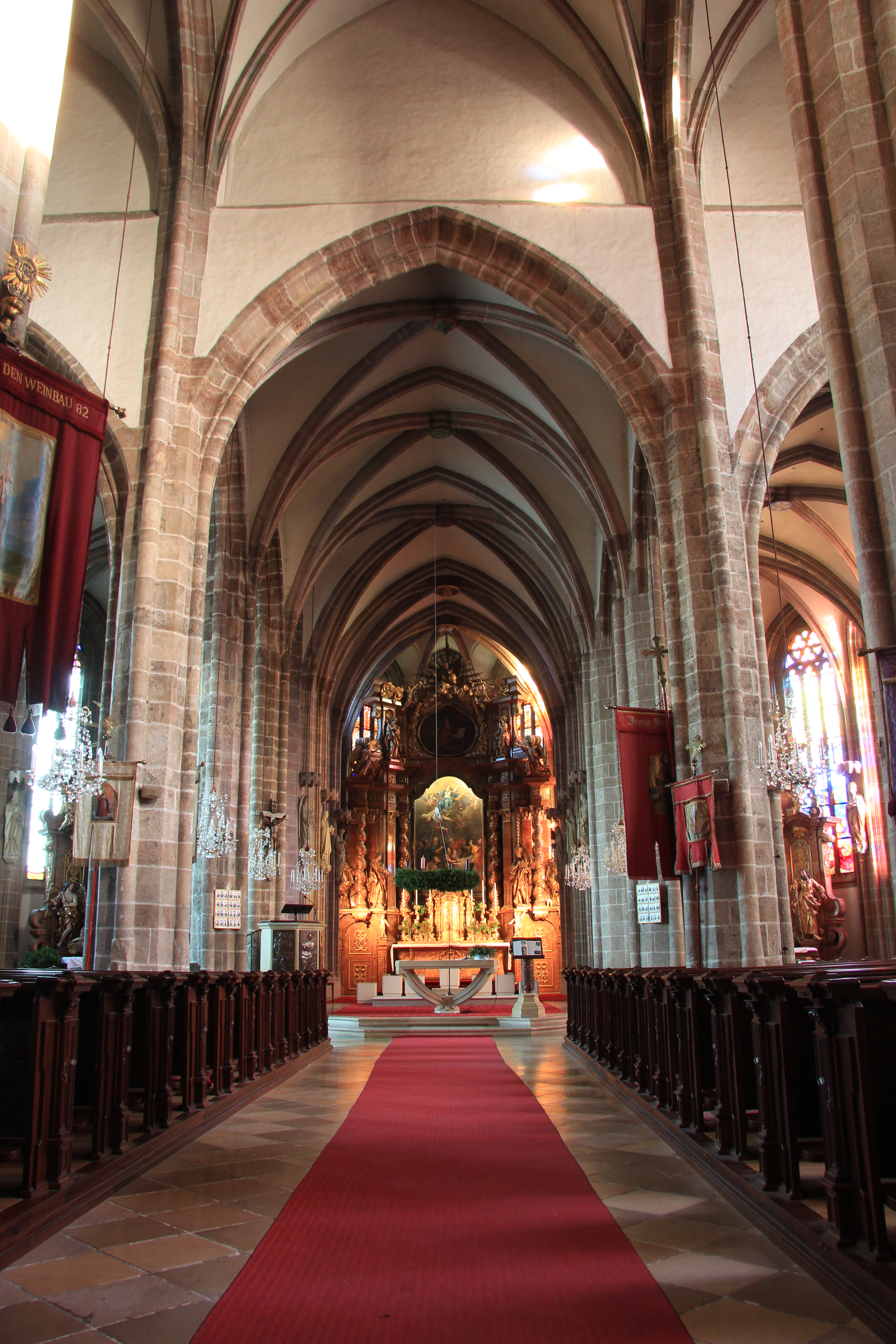 Pfarrkirche in Perchtoldsdorf